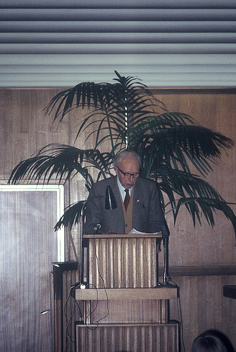 la nederlanda esperantisto Simon Aarse en 1974